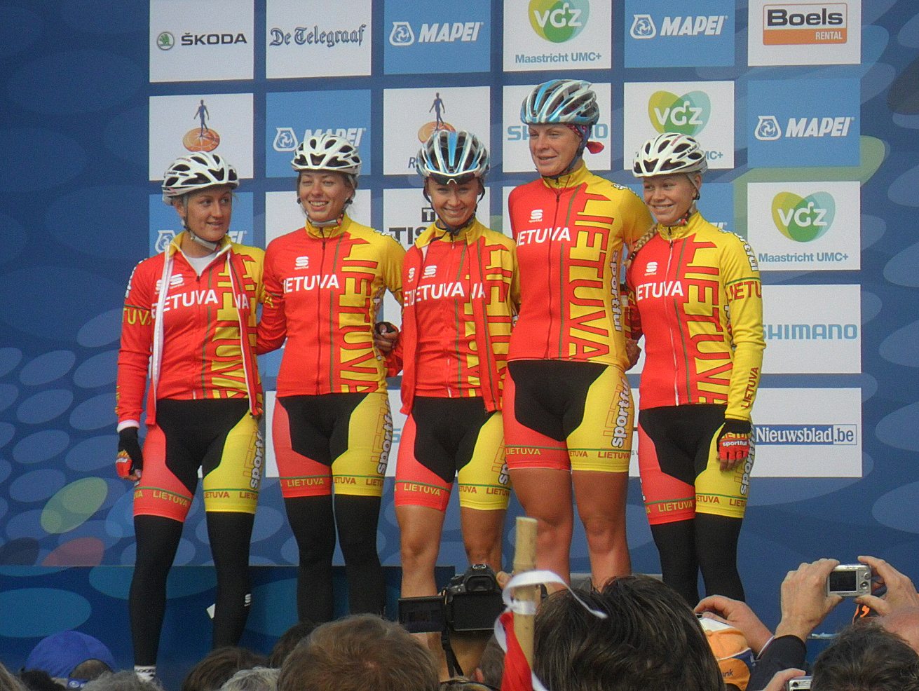 Ploegenpresentatie Litouwen voor de start van het Wereldkampioenschap 2012 in Valkenburg, Nederland.